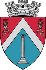 Coat of arms of Luduș, Romania (from ro.wiki:Stema orasului Ludus, judetul Mures. Coloana simbolizeaza evenimentele de la Oarba de Mures, iar spicele de grau functia preponderent agricola a orasului. Initial se prevedea si un fulger ca referire la Termocentrala din apropiere, insa nu se stie din ce motive, acesta a disparut.)